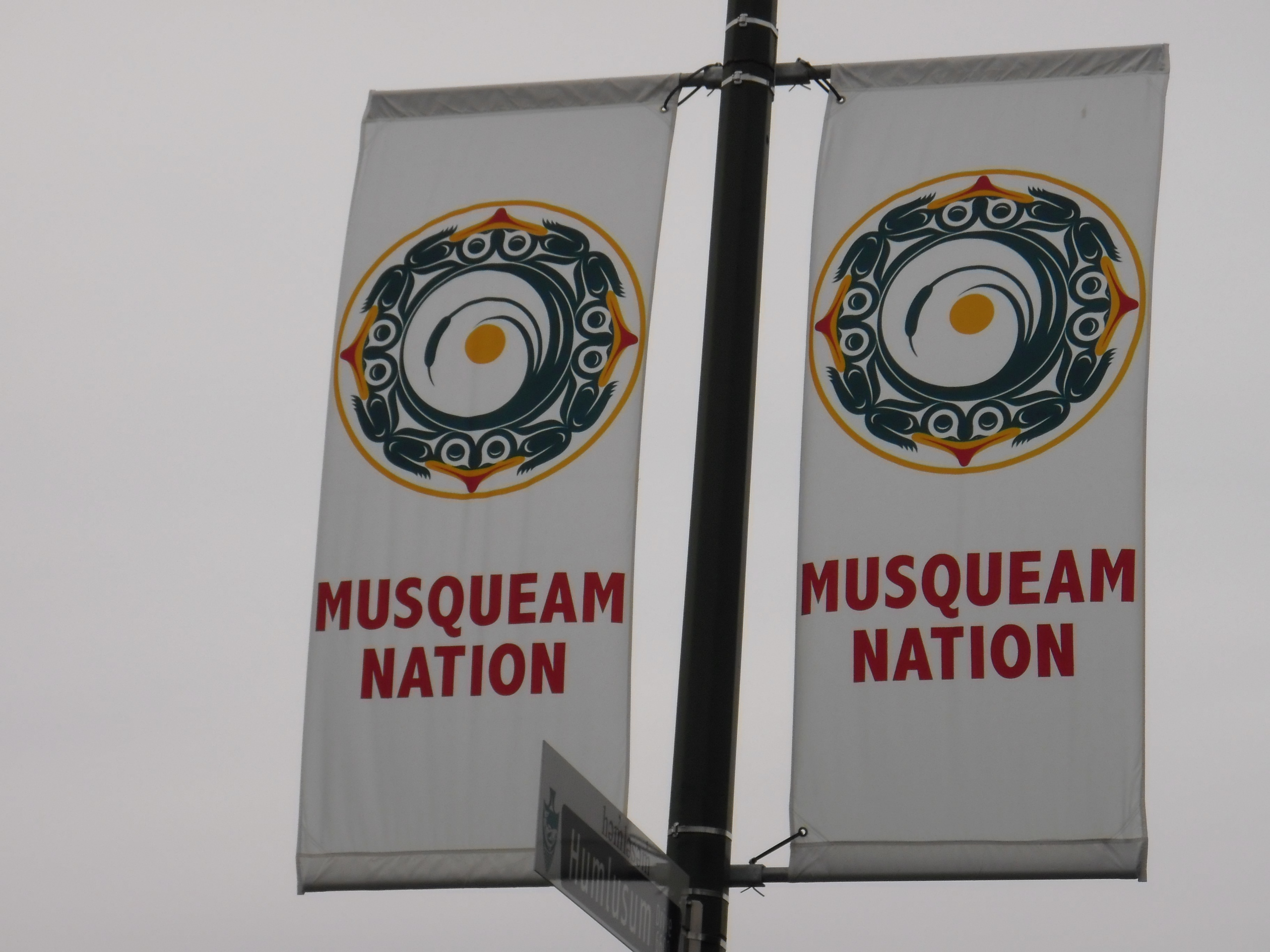 Musqueam Nation: Markierung am Eingang eines Musqueam-Wohngebiets bei Vancouver in Kanada.